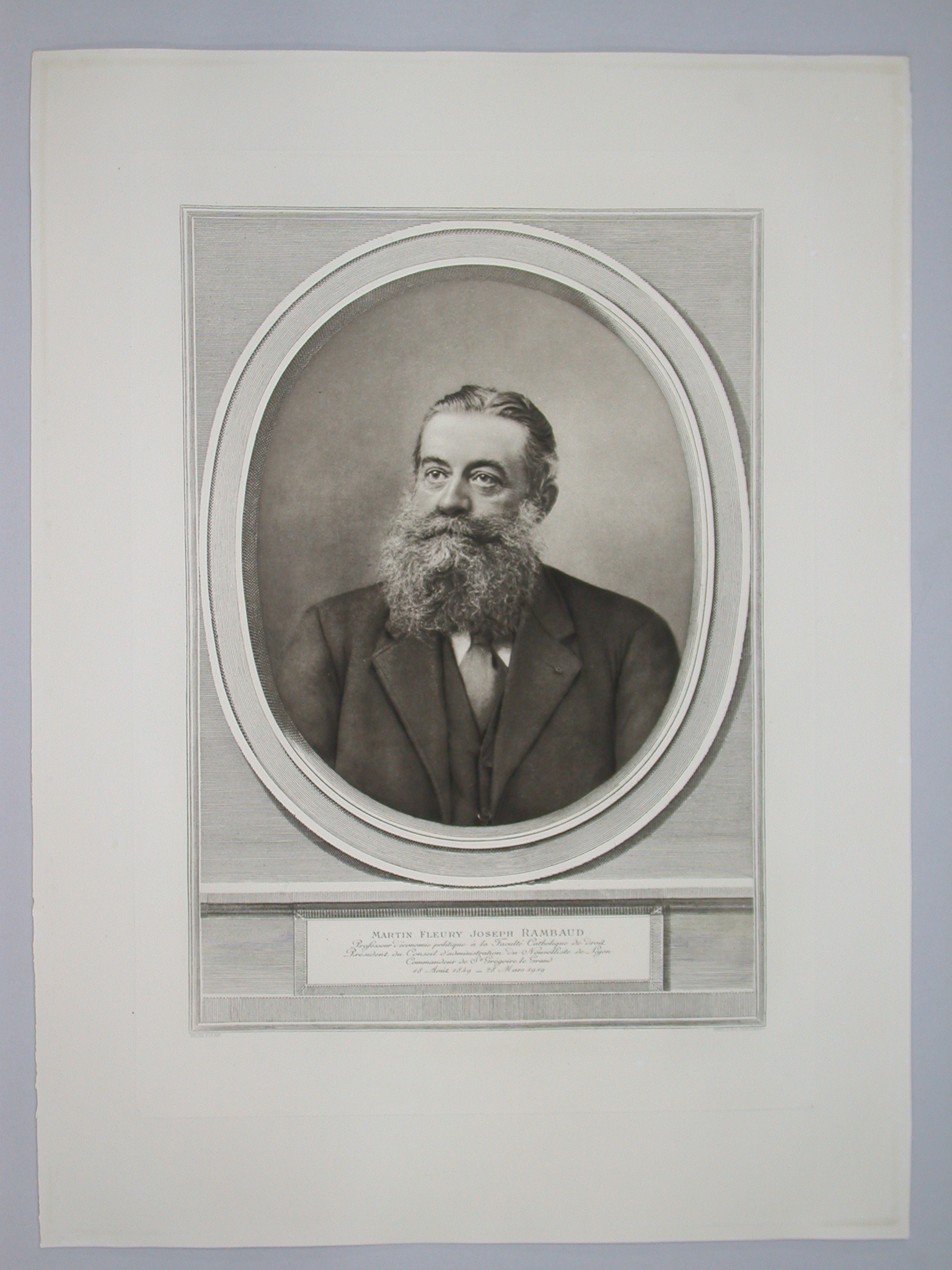 Joseph Rambaud (1919)